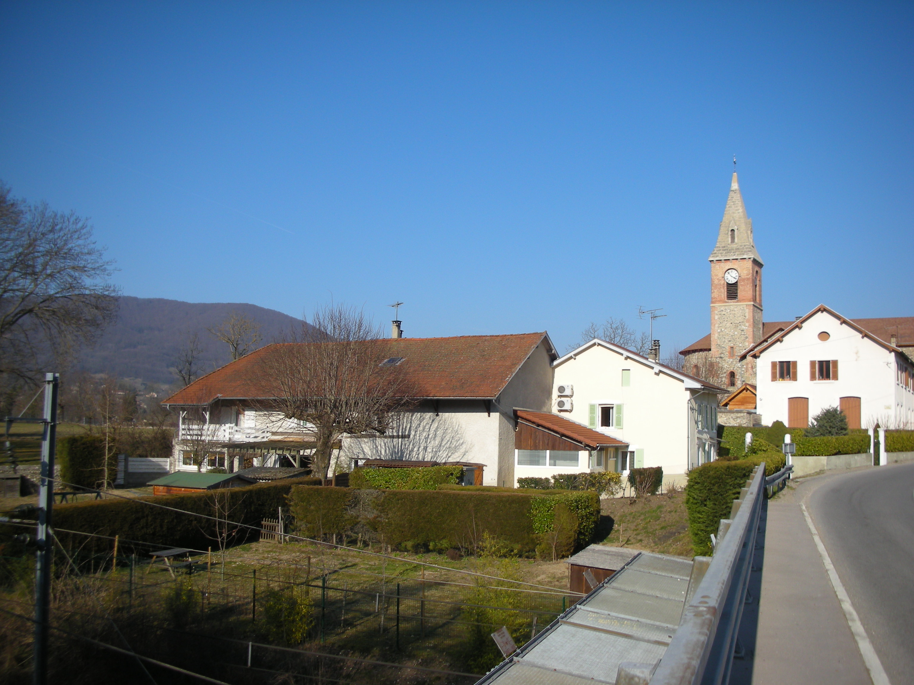 Saint-Cassien vu du cimetière (le village)